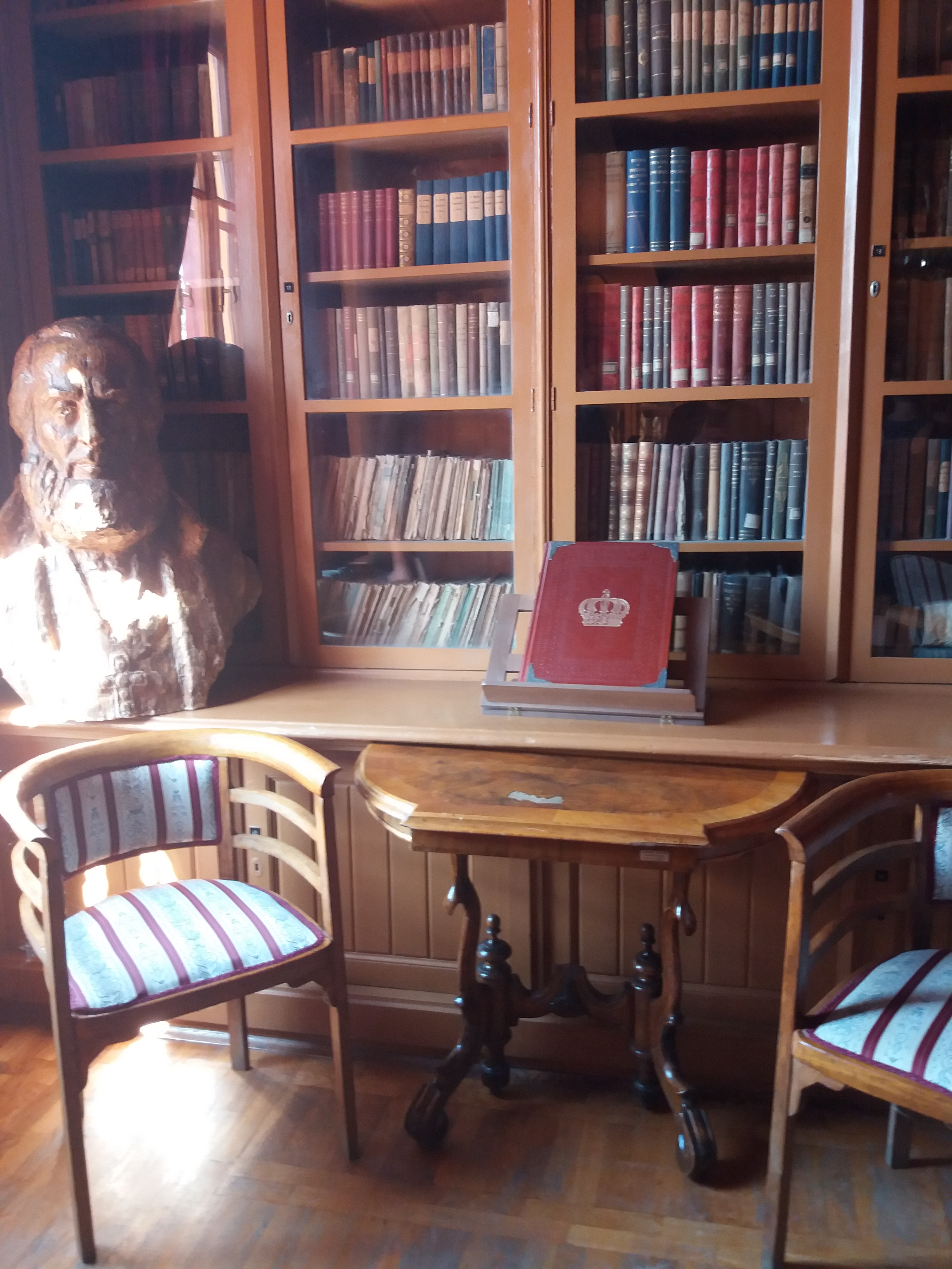 Srpski (latinica): Karlovačka gimnazija, Sremski Karlovci